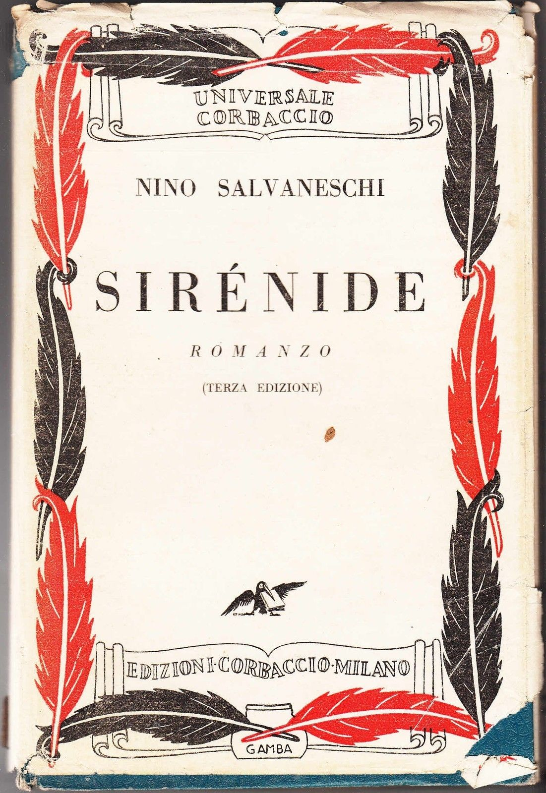 Copertina del romanzo Sirenide (1921) di Nino salvaneschi, edizione Corbaccio 1929.